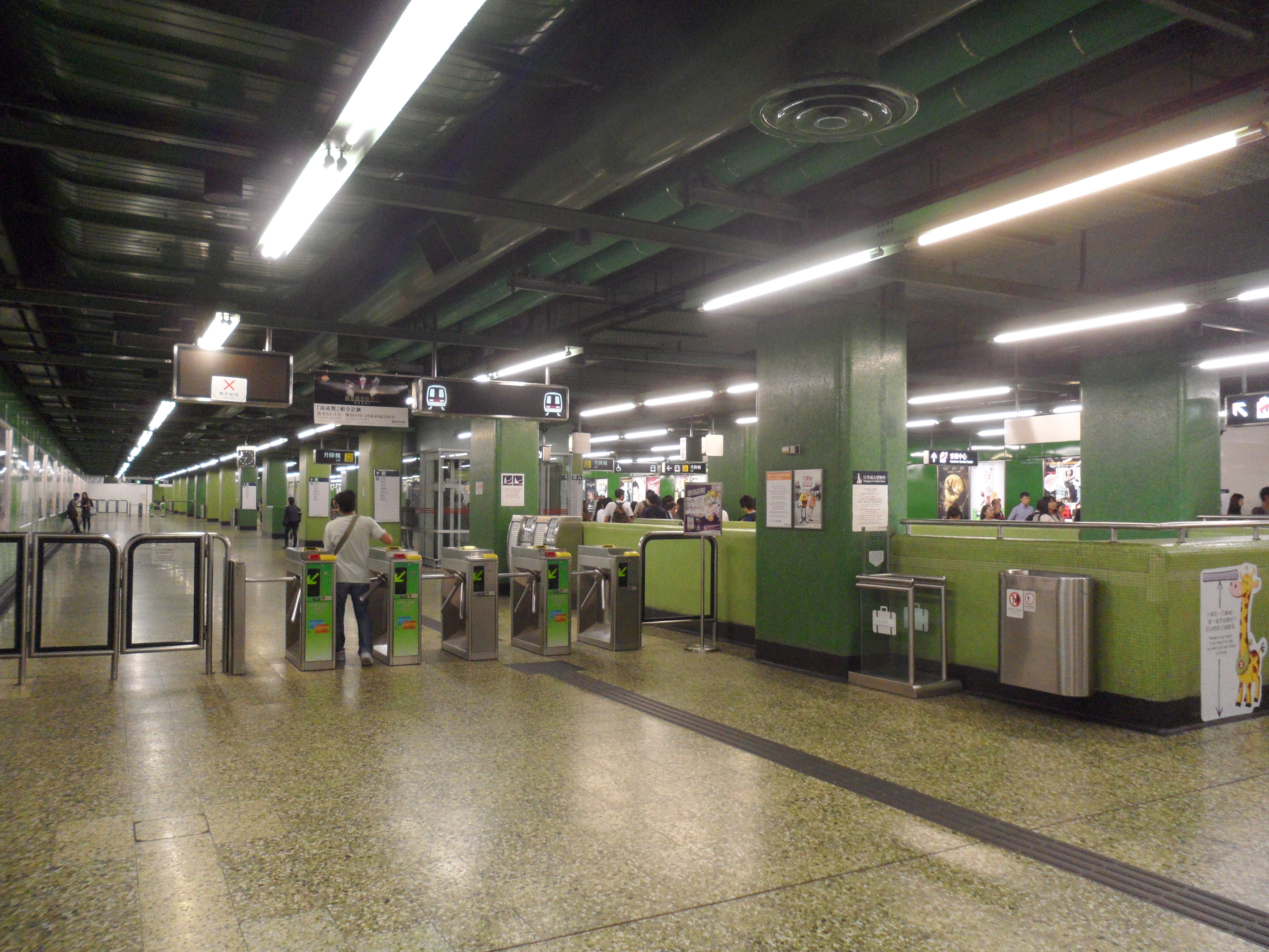 港鐵大窩口站大堂(非收費區)